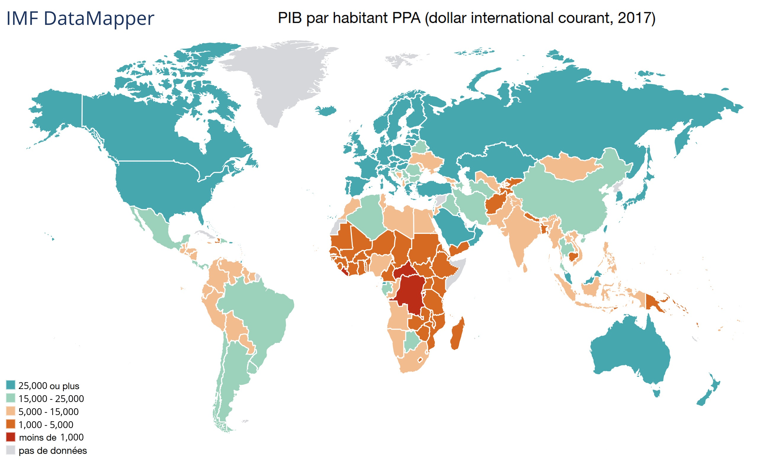 Carte monde du PIB par habitant, en PPA (2017) Source : Fonds monétaire international (avril 2017).